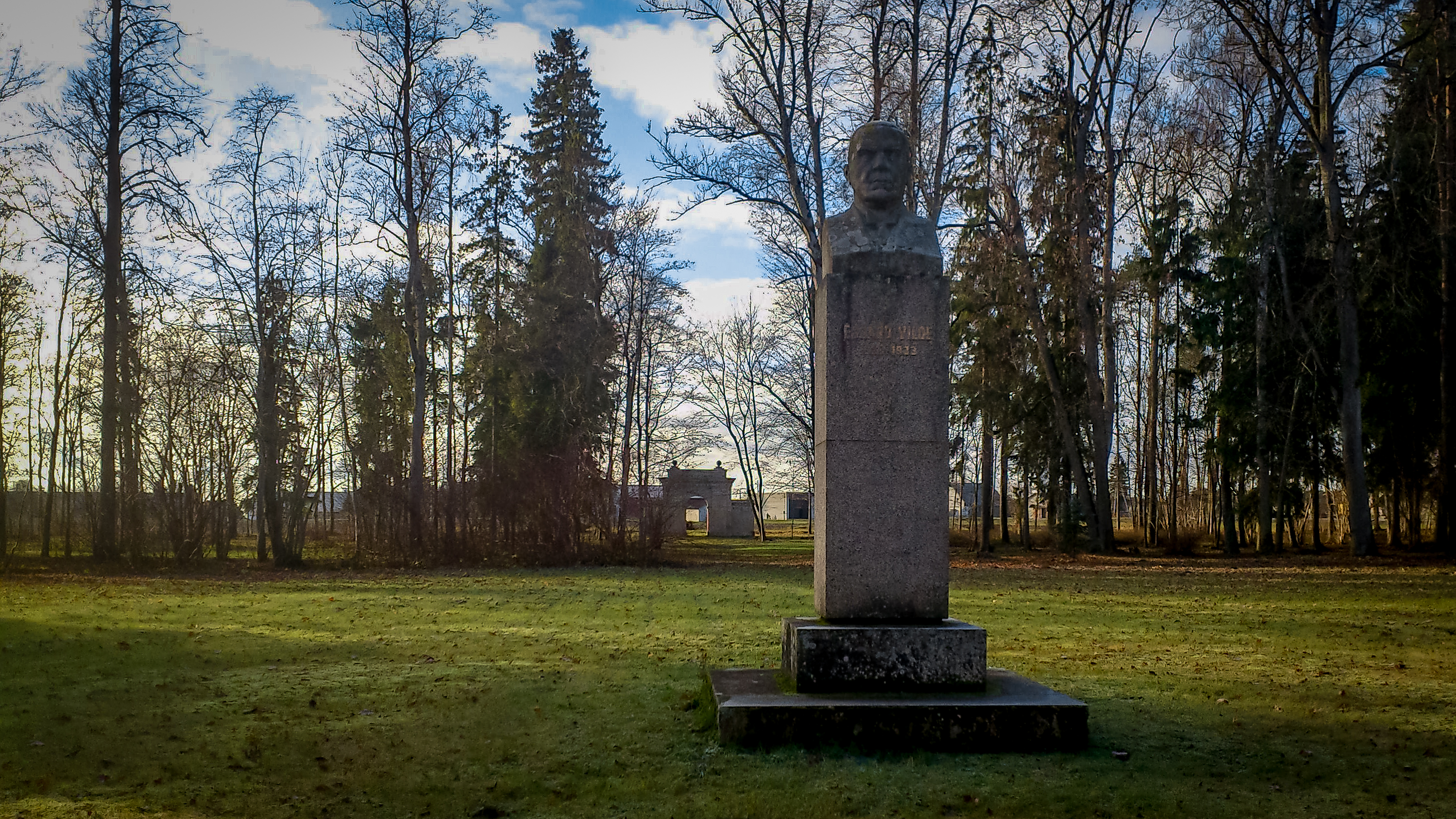 Muuga mõisa park